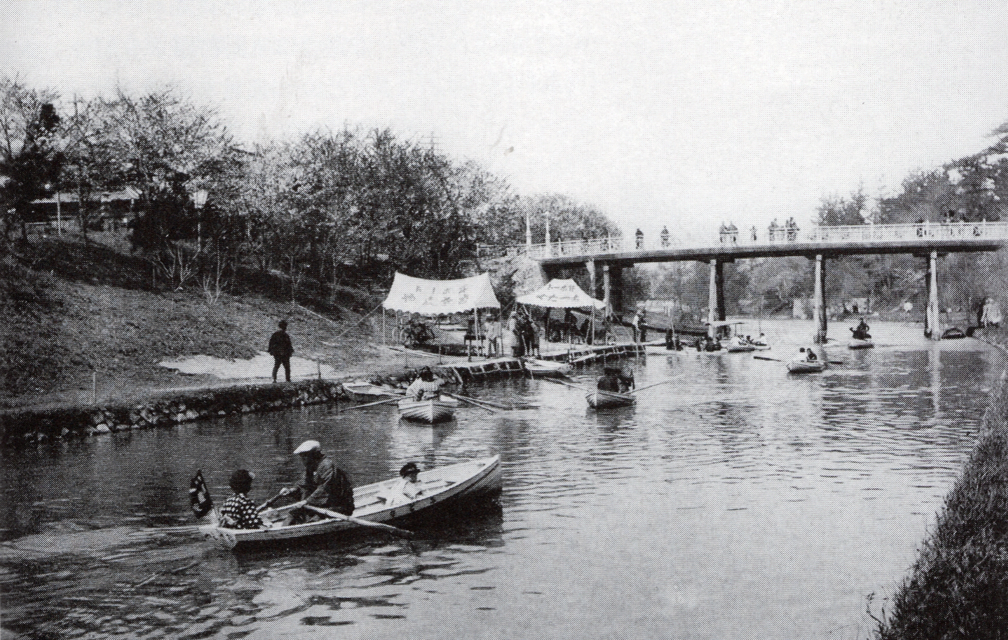 愛知県岡崎市。今はなき伊賀川の大正橋。現在の竹千代橋付近。1926年頃。